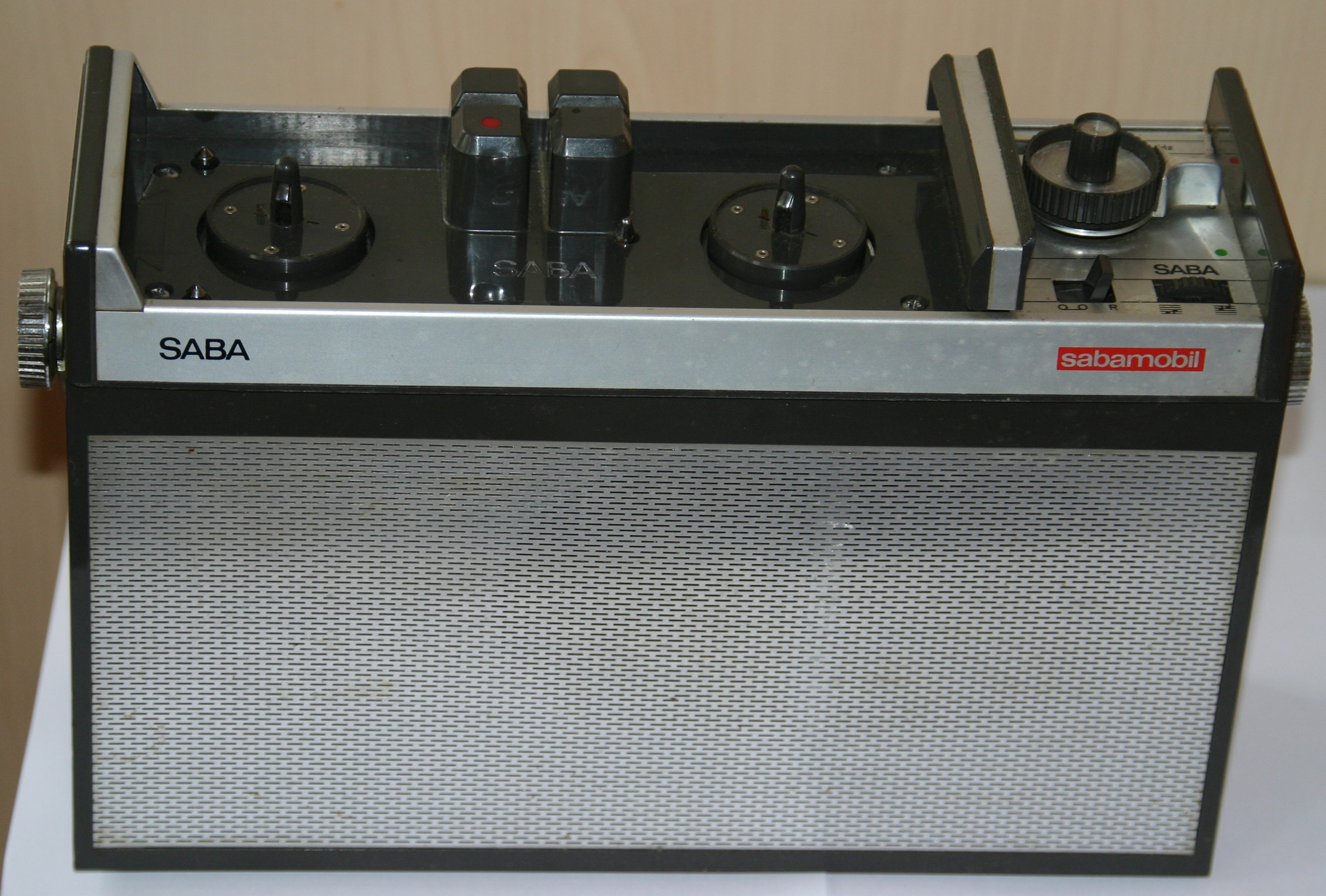 Sabamobil von vorne ohne Kasette Links und in der Mitte die beiden Bandteller, die vier Rechtecke dazwischen beherbergen Tonköpfe und Capstan. Ganz rechts der Lautstärkeregler, daneben der Umschalter Tonband/Mittelwelle. Dahinter der Aufnahme-/Wiedergabe-Knebel mit integriertem Grob/Feinregler für die Mittelwellenfrequenz.